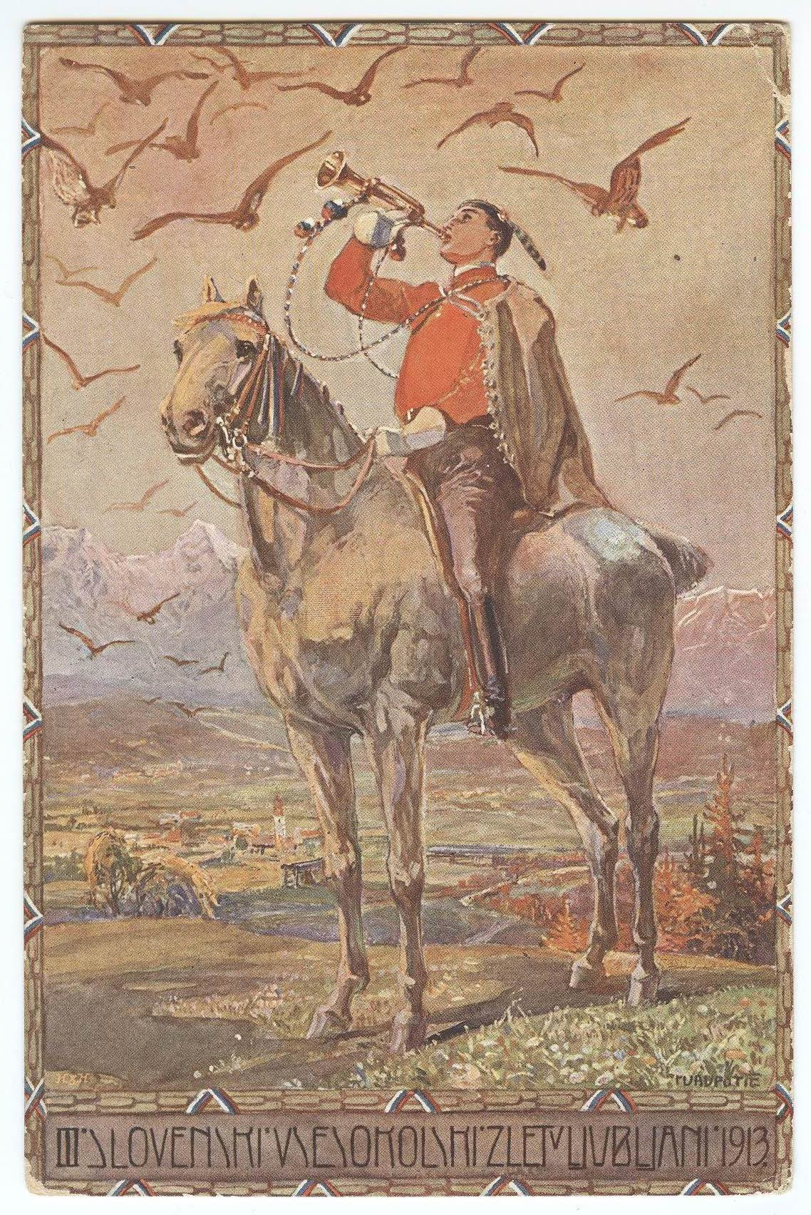 Sokolski plakat.